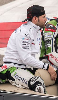 Hector Barbera 2015